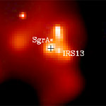 Röntgen-Foto von „Sagittarius A*“ und „IRS 13“ im Zentrum der Milchstraße